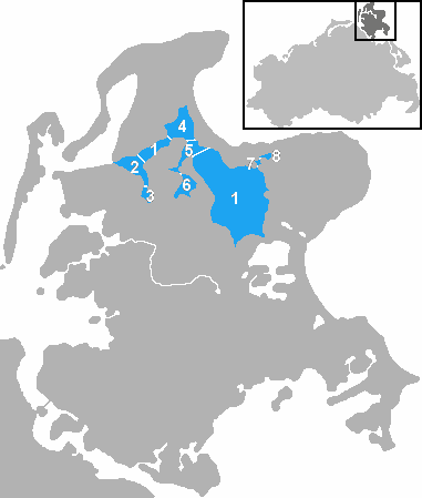 Großer Jasmunder Bodden Breetzer Bodden Neuendorfer Wiek Breeger Bodden Lebbiner Bodden Tetzitzer See Mittelsee Spykerscher See